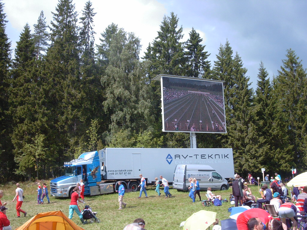 Medienpräsenz beim Orientierungslauf in Schweden (3. Etappe des O-Ringen 2005 in der Nähe von Jönköpping)